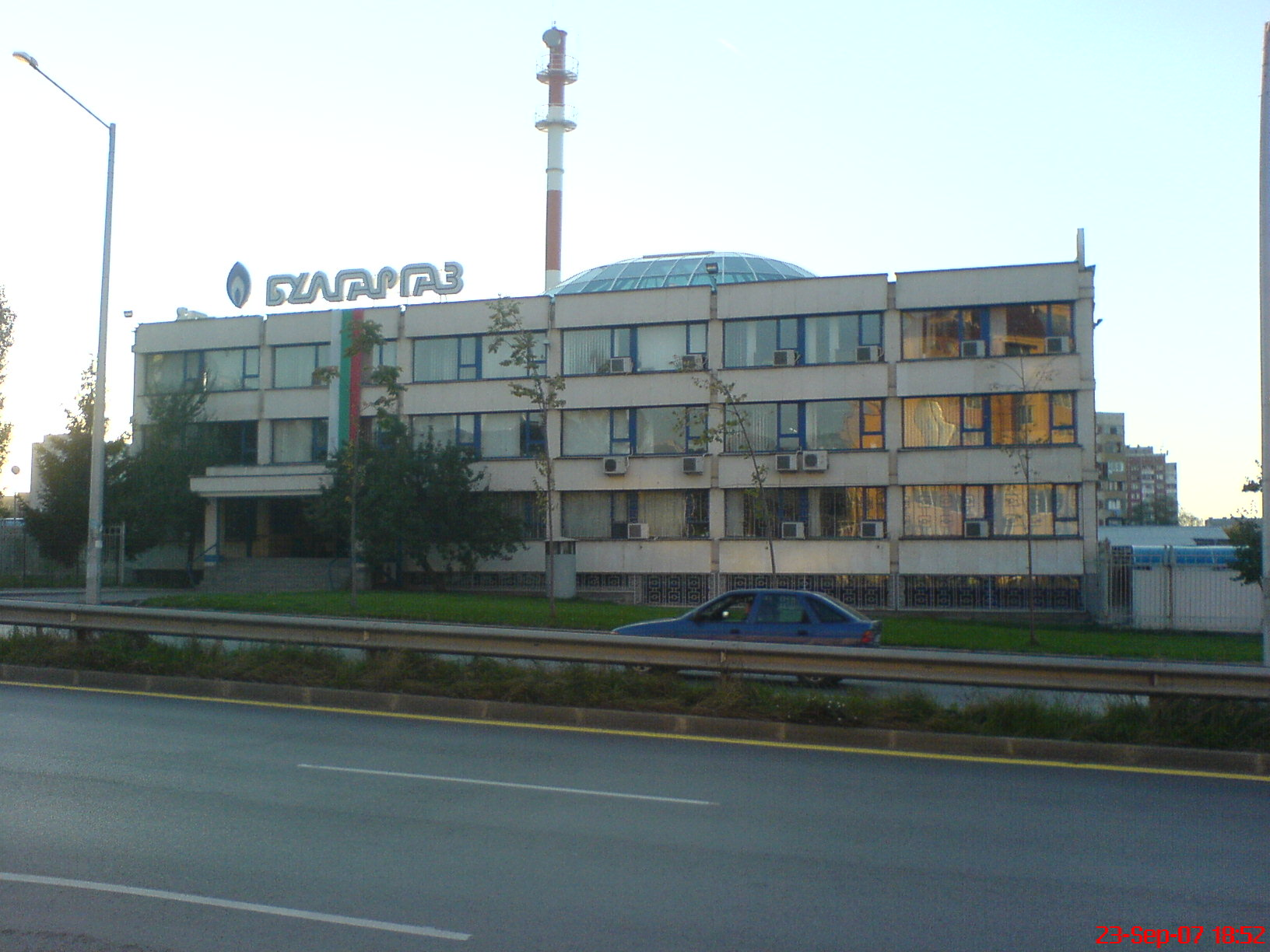 Централата на Булгаргаз, намираща се на територията на район Люлин